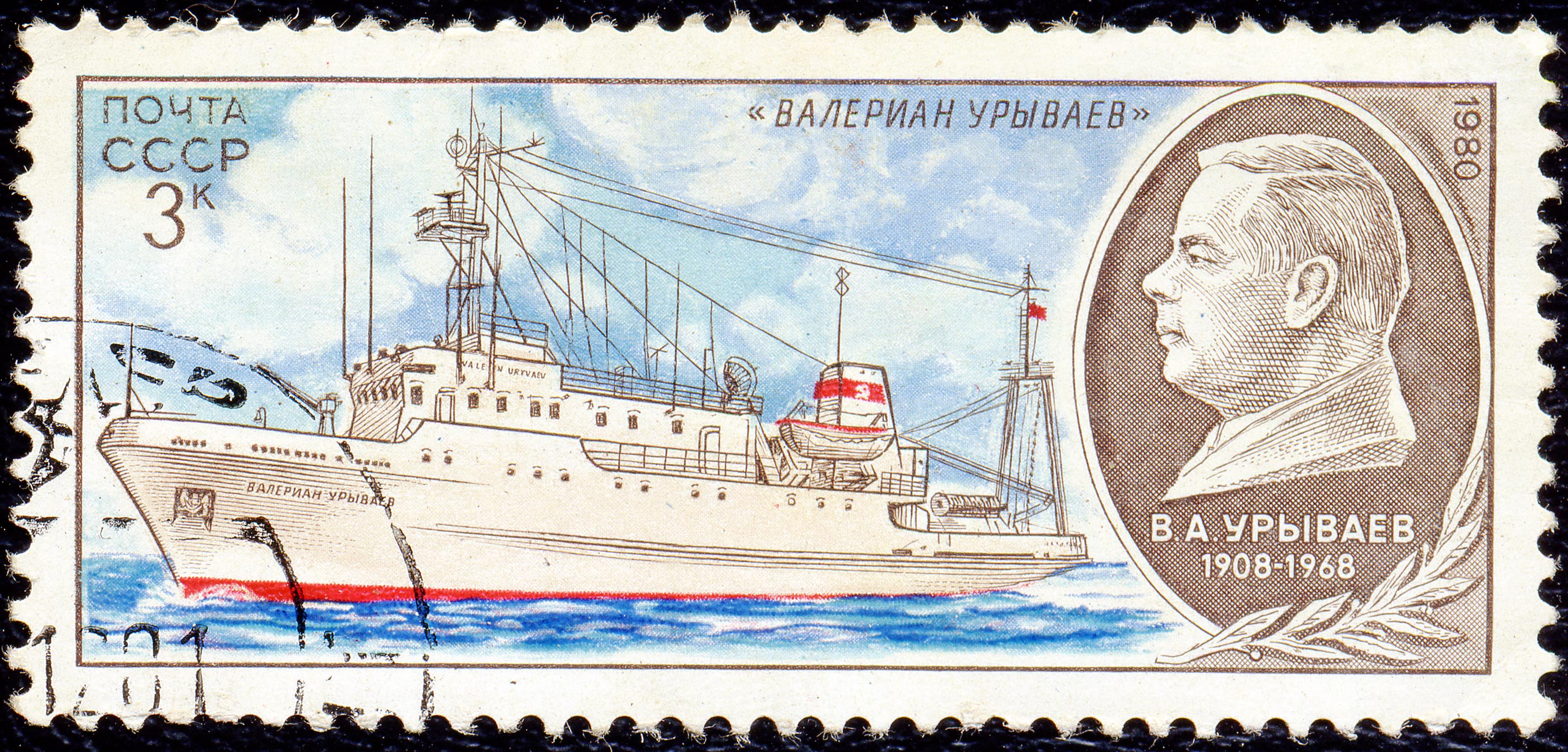 Почтовая марка СССР. 1980. Валериан Урываев